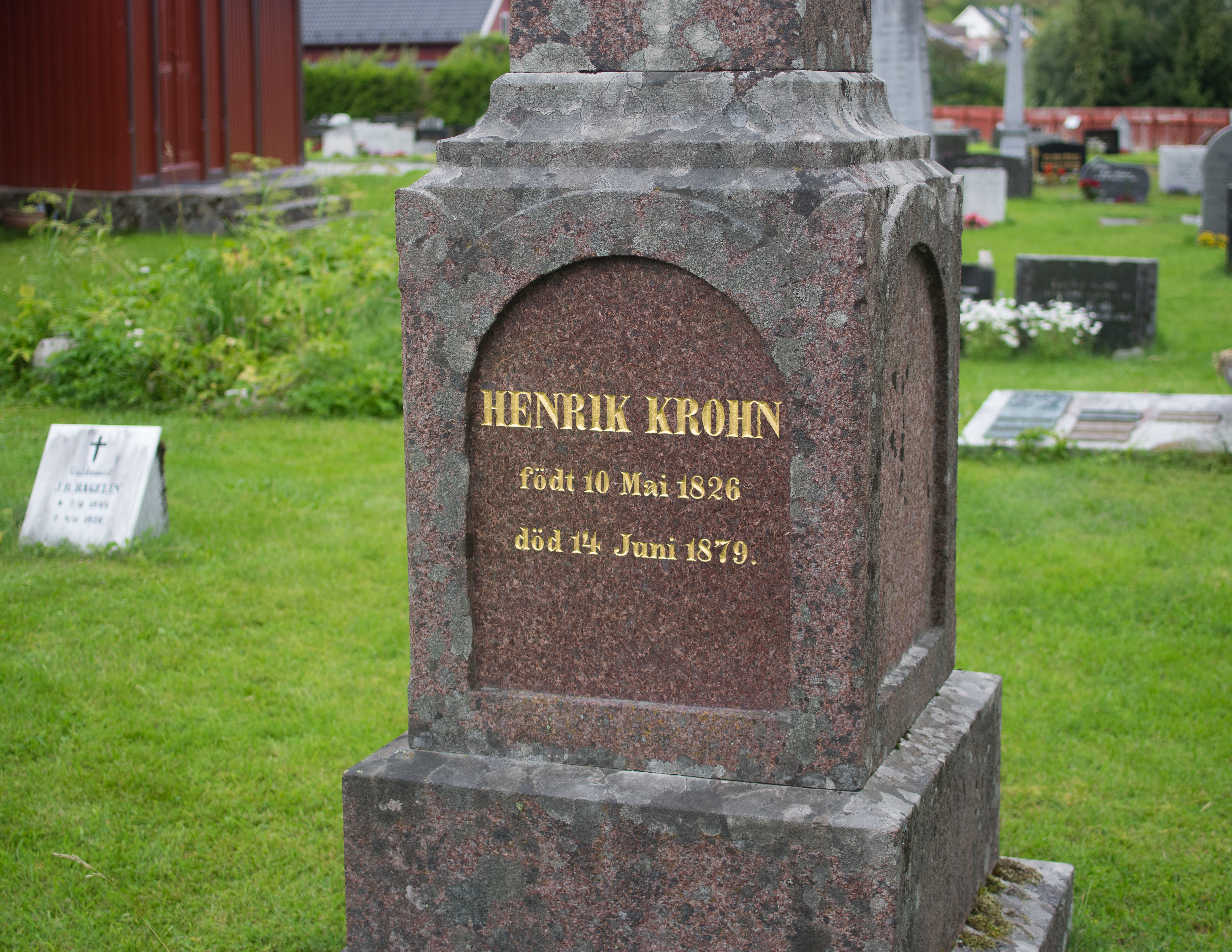 Henrik Krohn (1826-1879) sin gravstein i Sogndal.